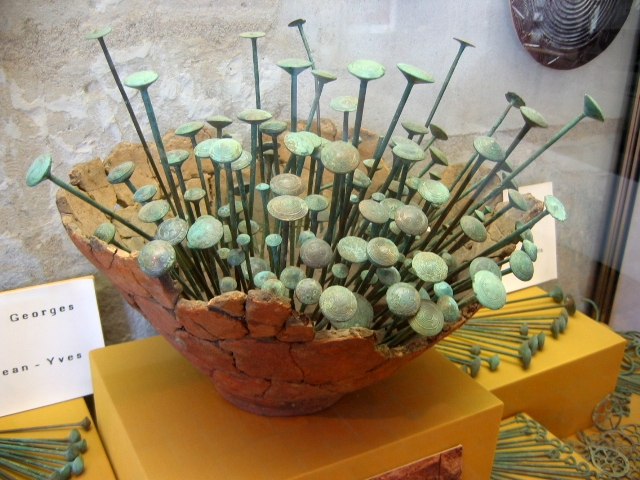 Musée de Sens, Yonne, France : trésor de Villethierry : épingles du stock d'un artisan bijoutier